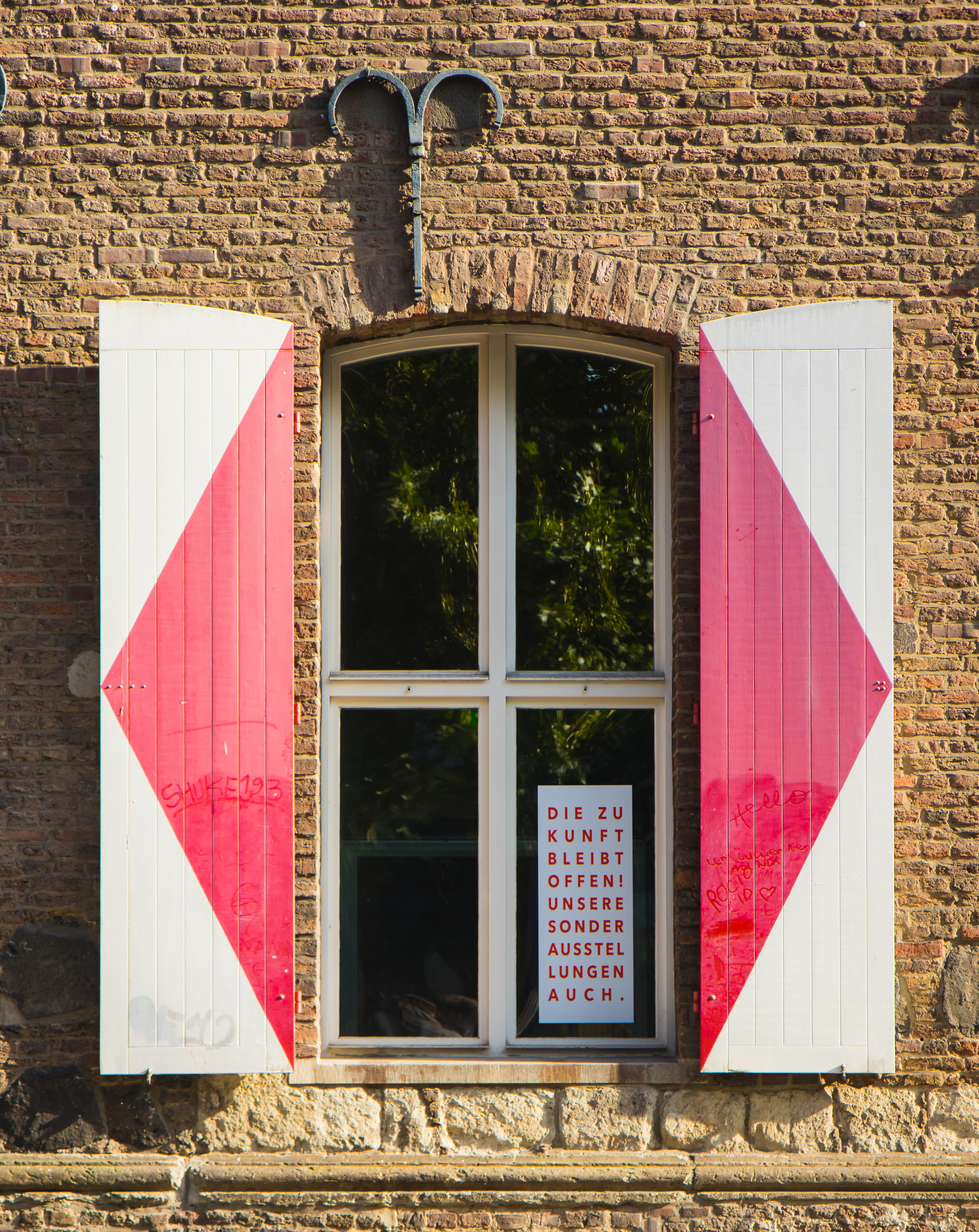 Kölnisches Stadtmuseum in Zeughaus und Alter Wache. Hier: Treppenturm mit „Goldener Vogel“ von HA Schult